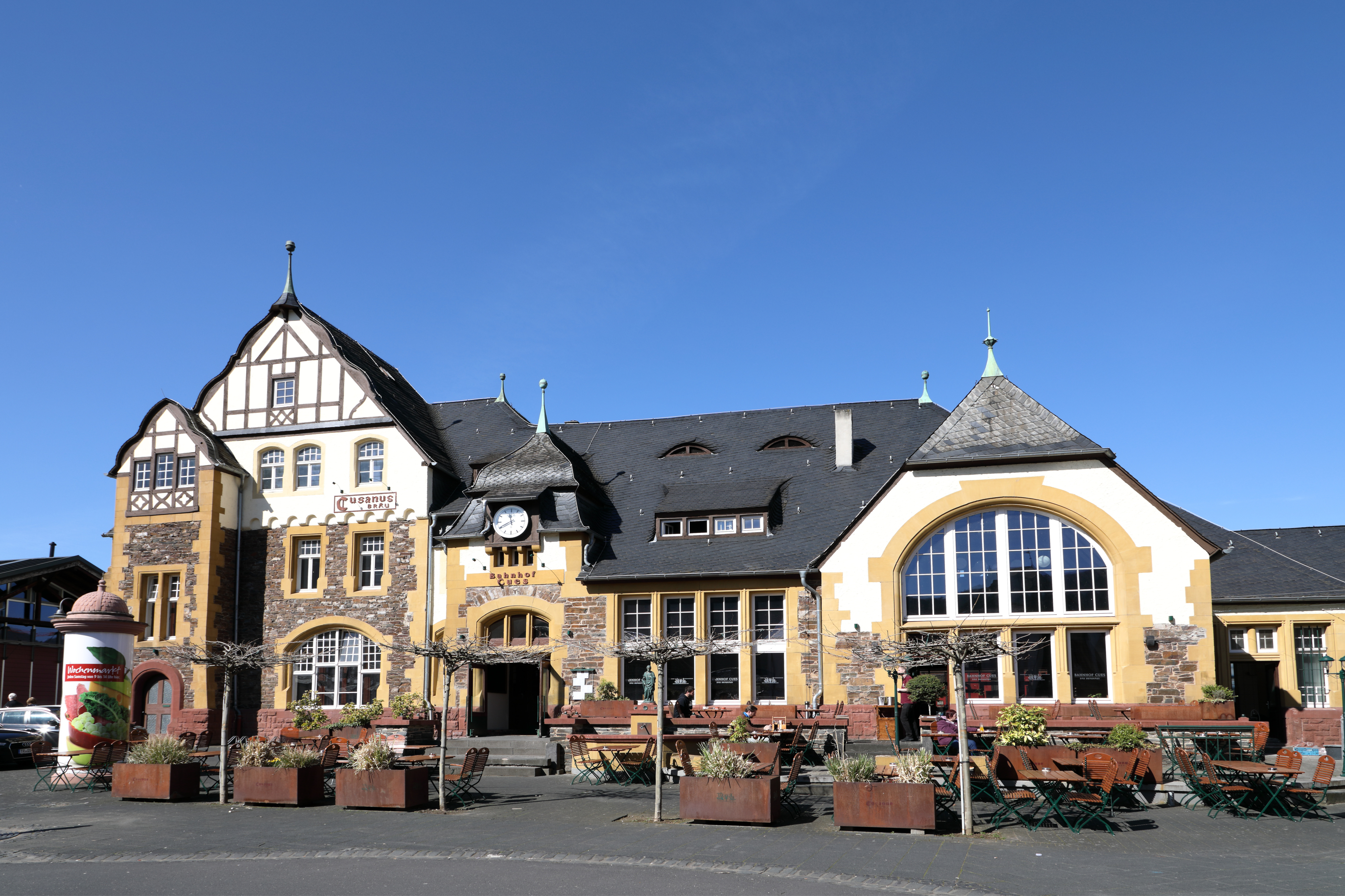 Der ehemalige Bahnhof im Ortsteil Kues von Bernkastel-Kues.